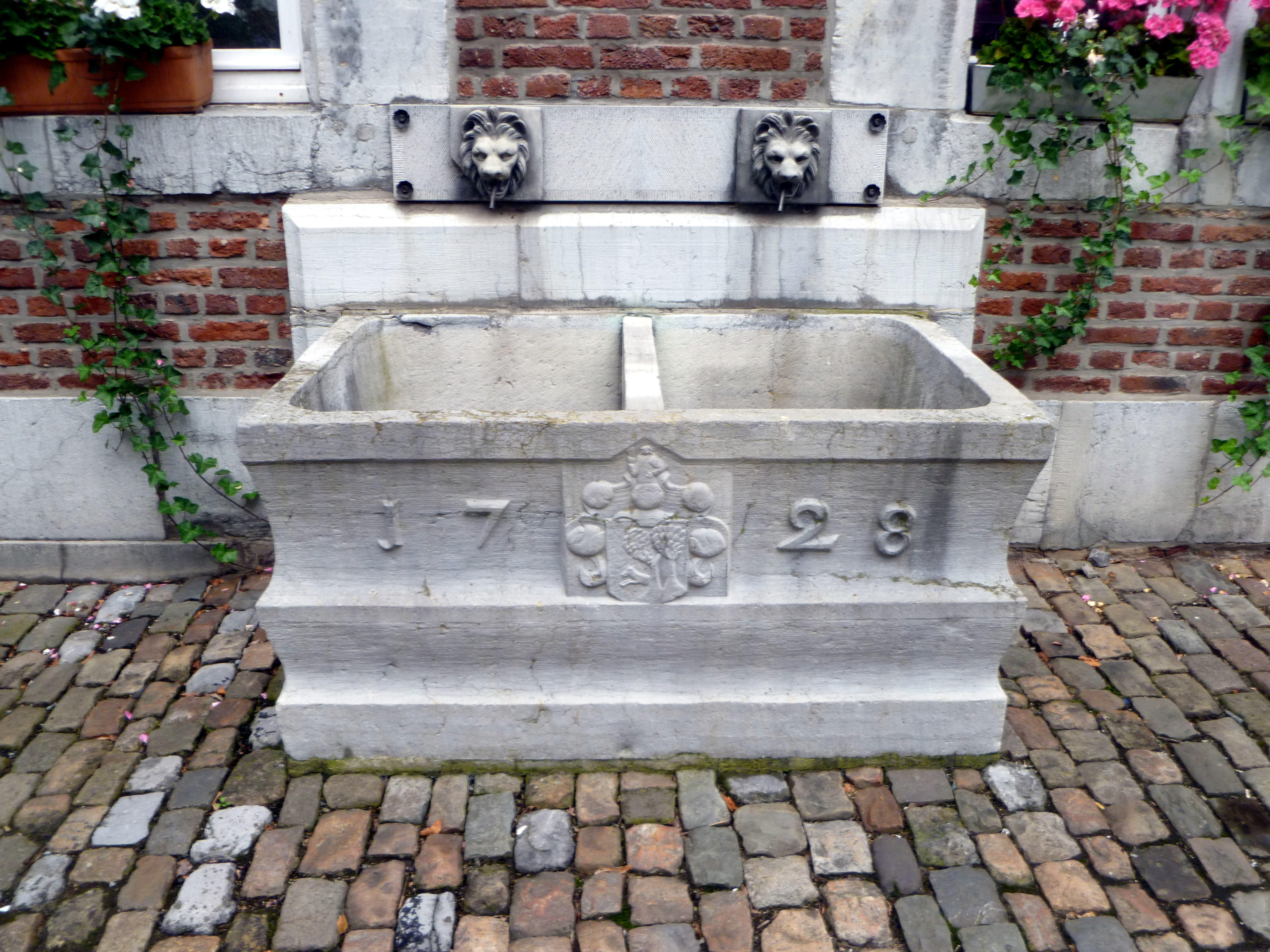 Brunnen im Haus Rehrmann-Fey, Kapernberg, Eupen